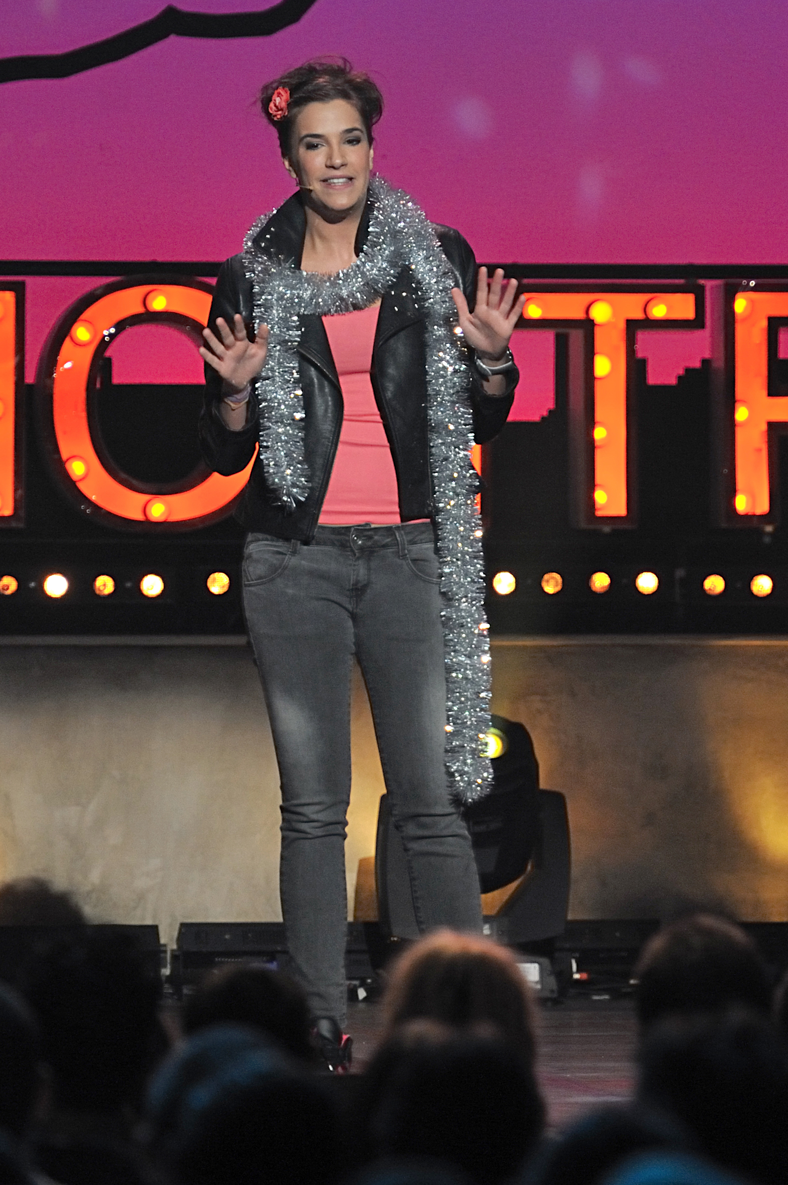 Charlotte Gabris au Festival du rire de Montreux, le 4 décembre 2010.